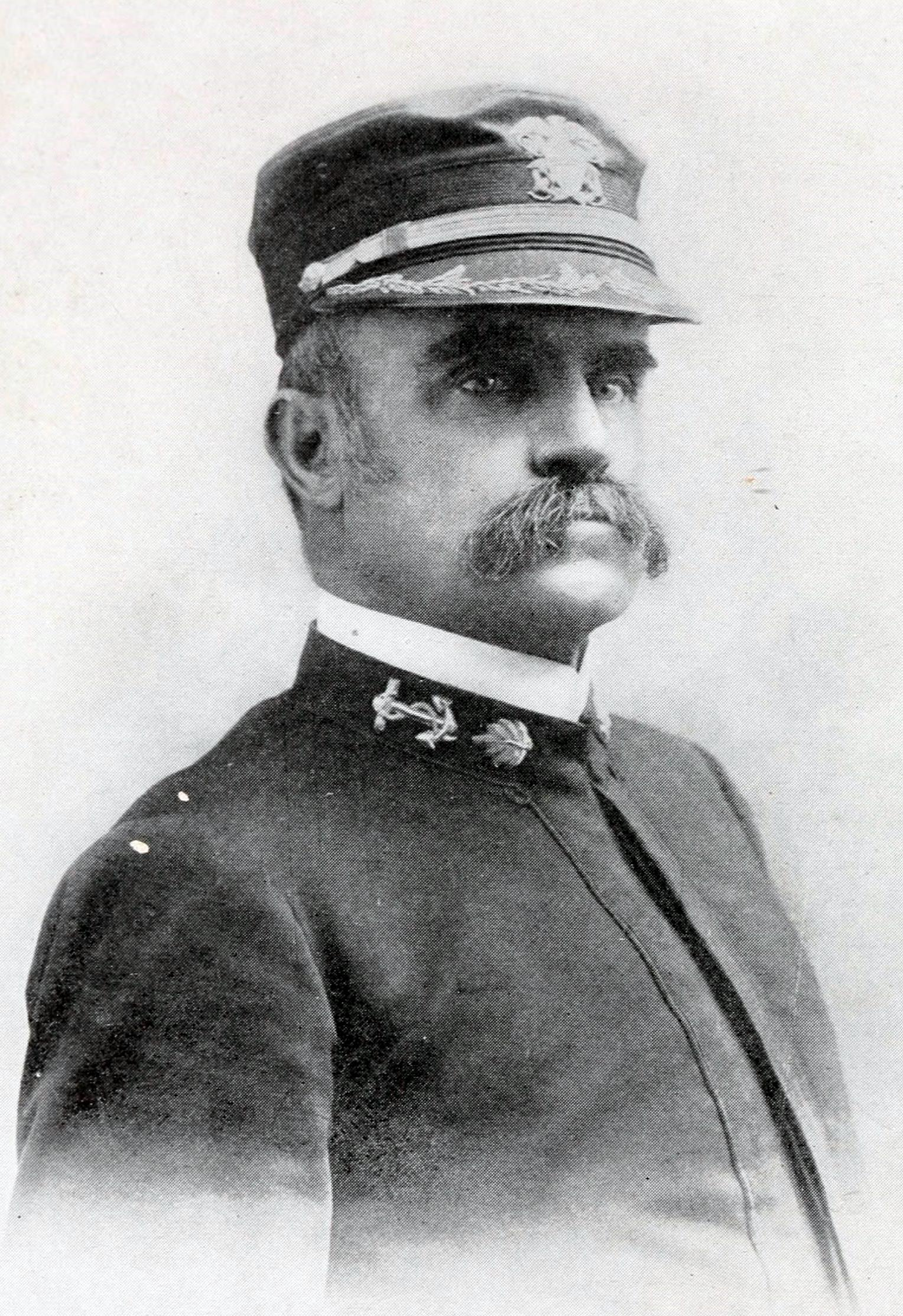 Charles E Colahan